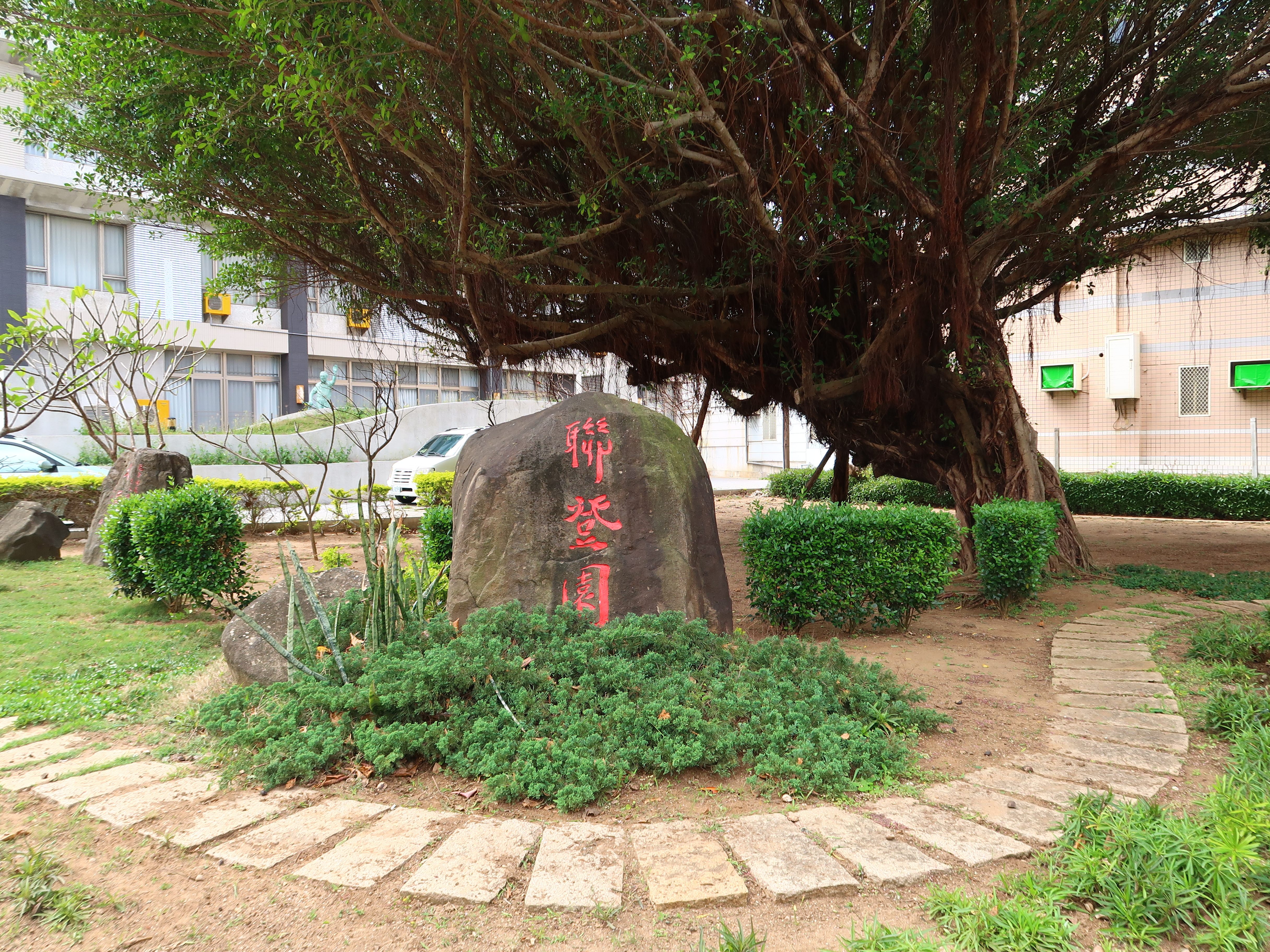 民國93年（2004年）6月16日，澎湖縣政府為了感念林聯登在澎湖付出的貢獻，在市區闢建的青青草原中，特將惠民醫院附近的綠地命名為「聯登園」，以茲不忘。